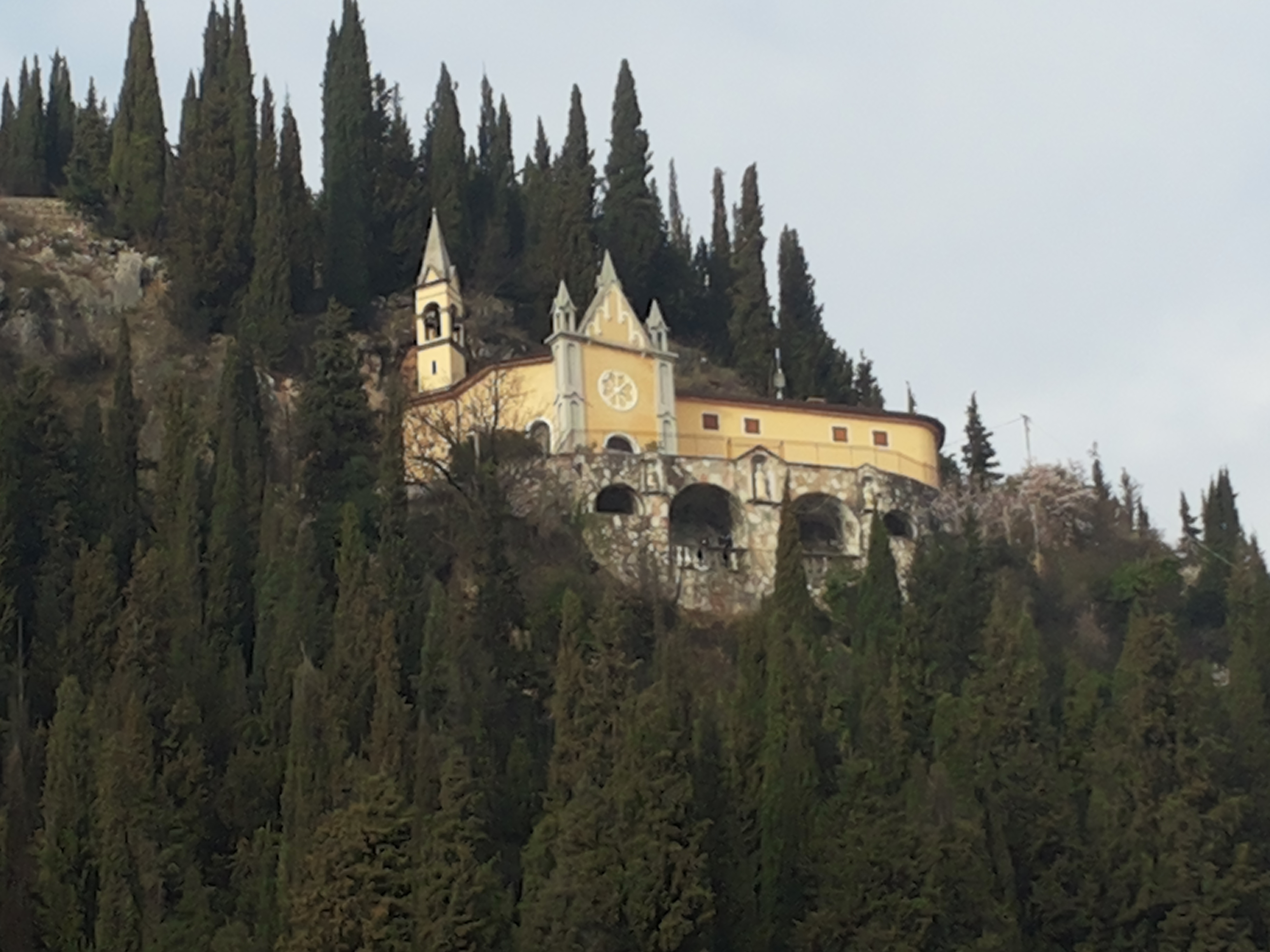 Santuario Nostra Signora di La Salette - XIX secolo - Fumane (Verona - Italia)